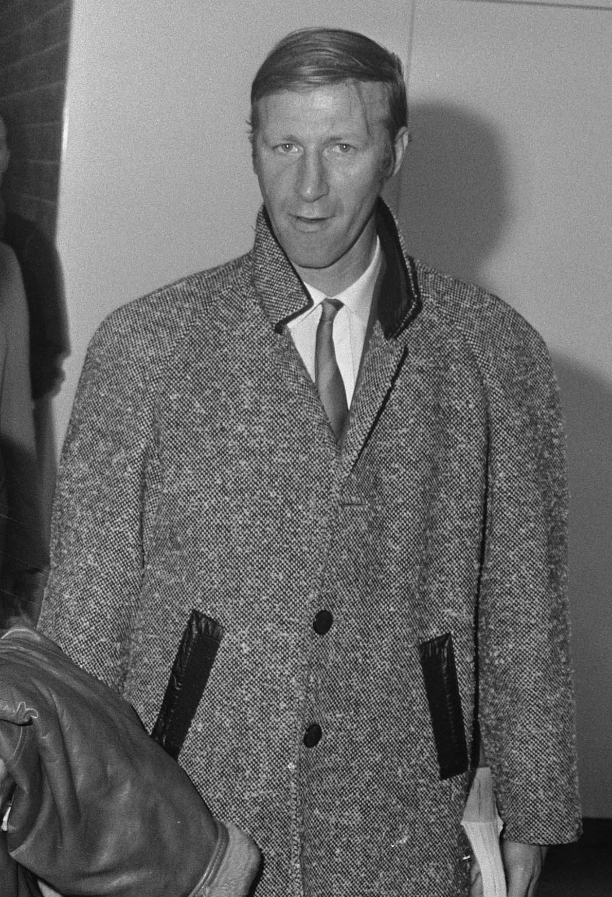 Jack Charlton bij aankomst op Schiphol voor de interland tussen Nederland en Engeland